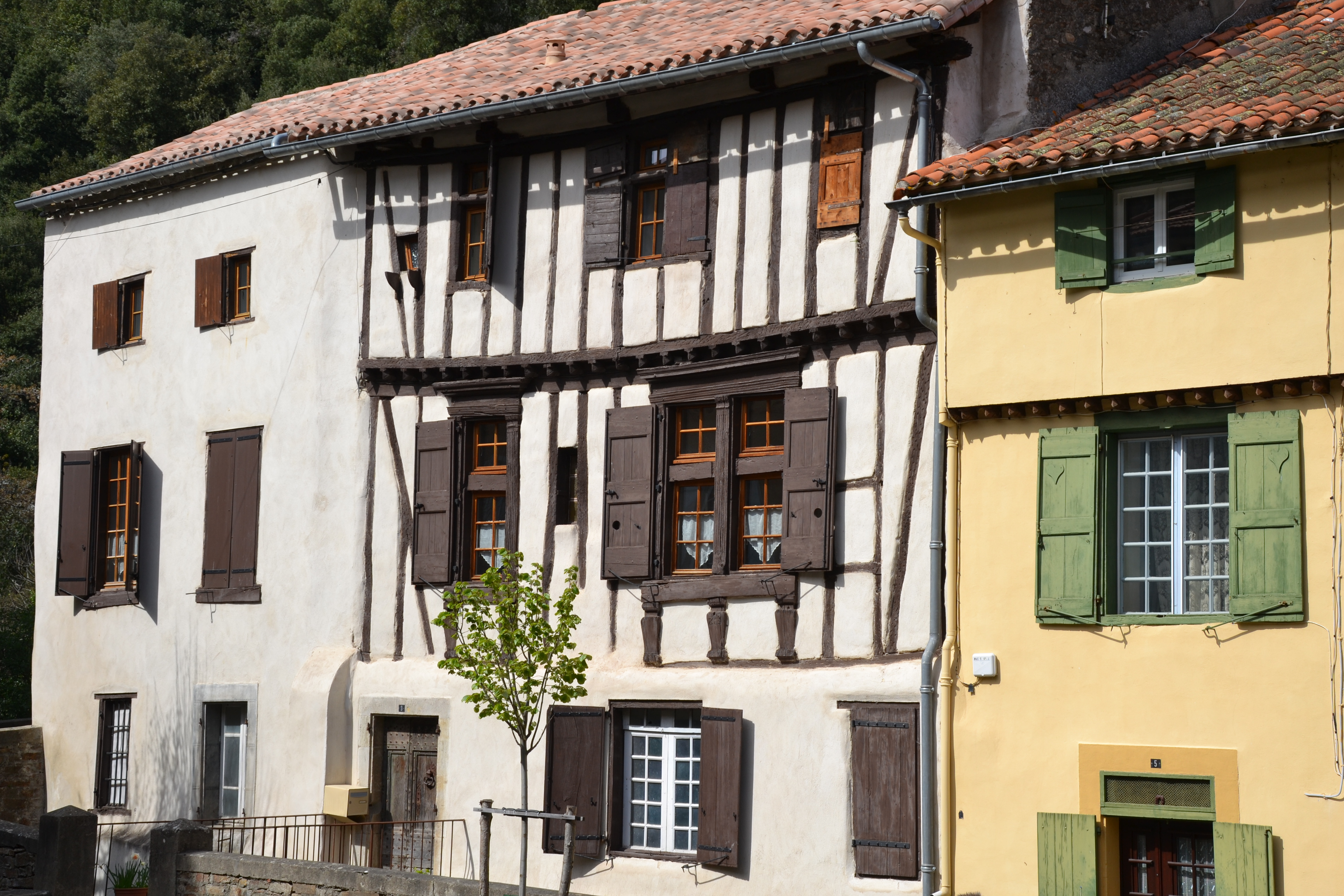 Maison à colombage du XVI siècle située sur la place centrale de Mas-Cabardès